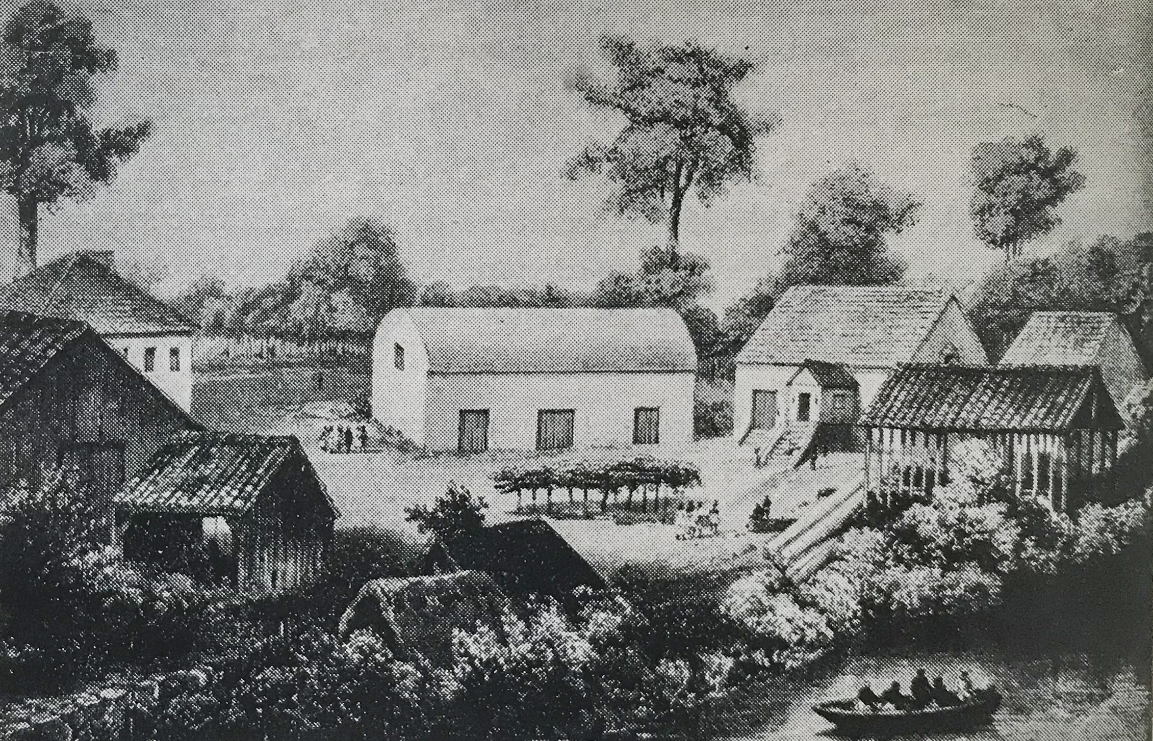 Le comptoir franco-belge de Bicaise sur le Rio Nunez